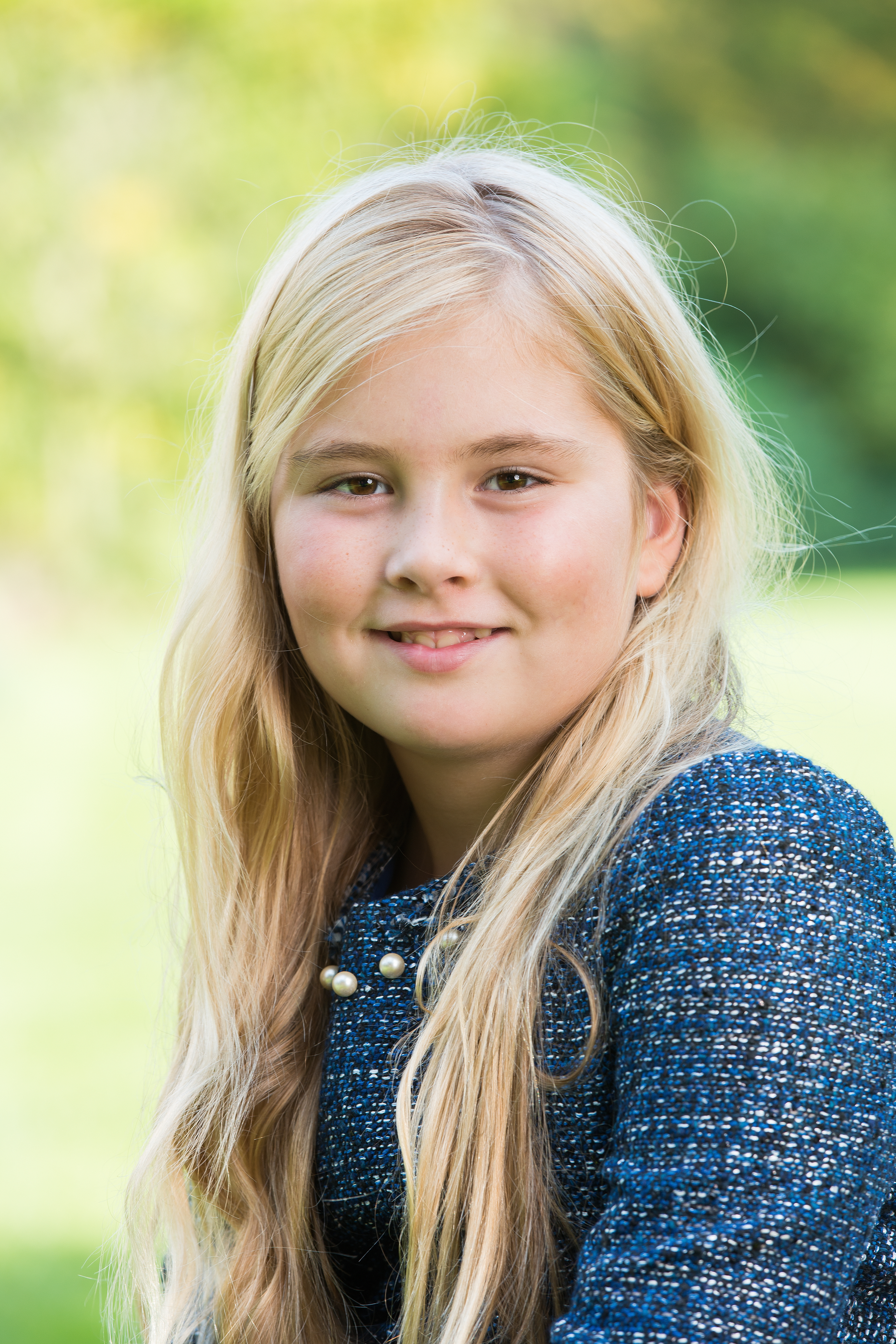 Wassenaar, najaar 2014: de Prinses van Oranje.